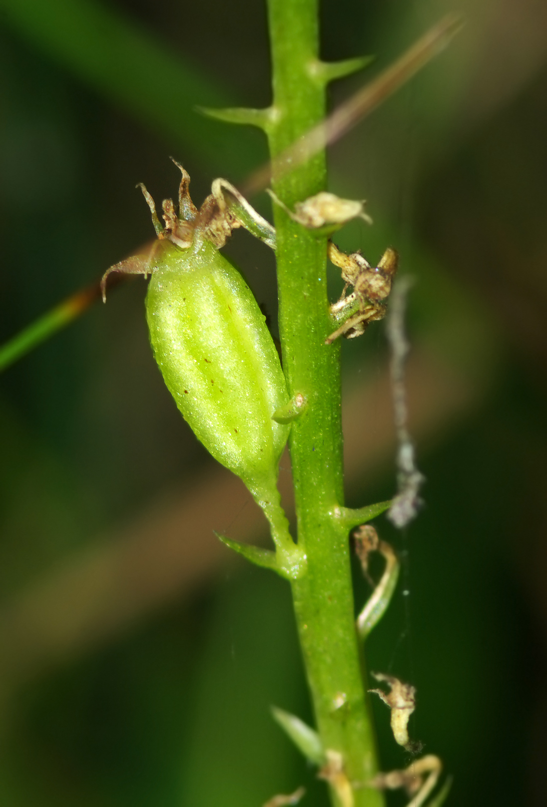 Wyblin jednolistny (Malaxis monophyllos) - fruit - owoc